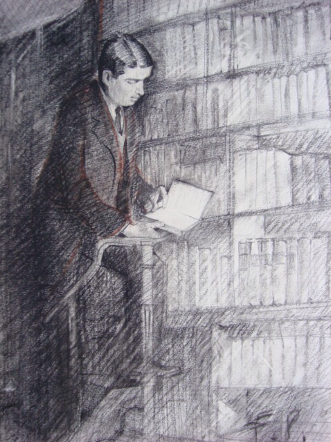 Jean de Pange dans sa bibliothèque Rue de Varenne, dessin par son fils François de Pange